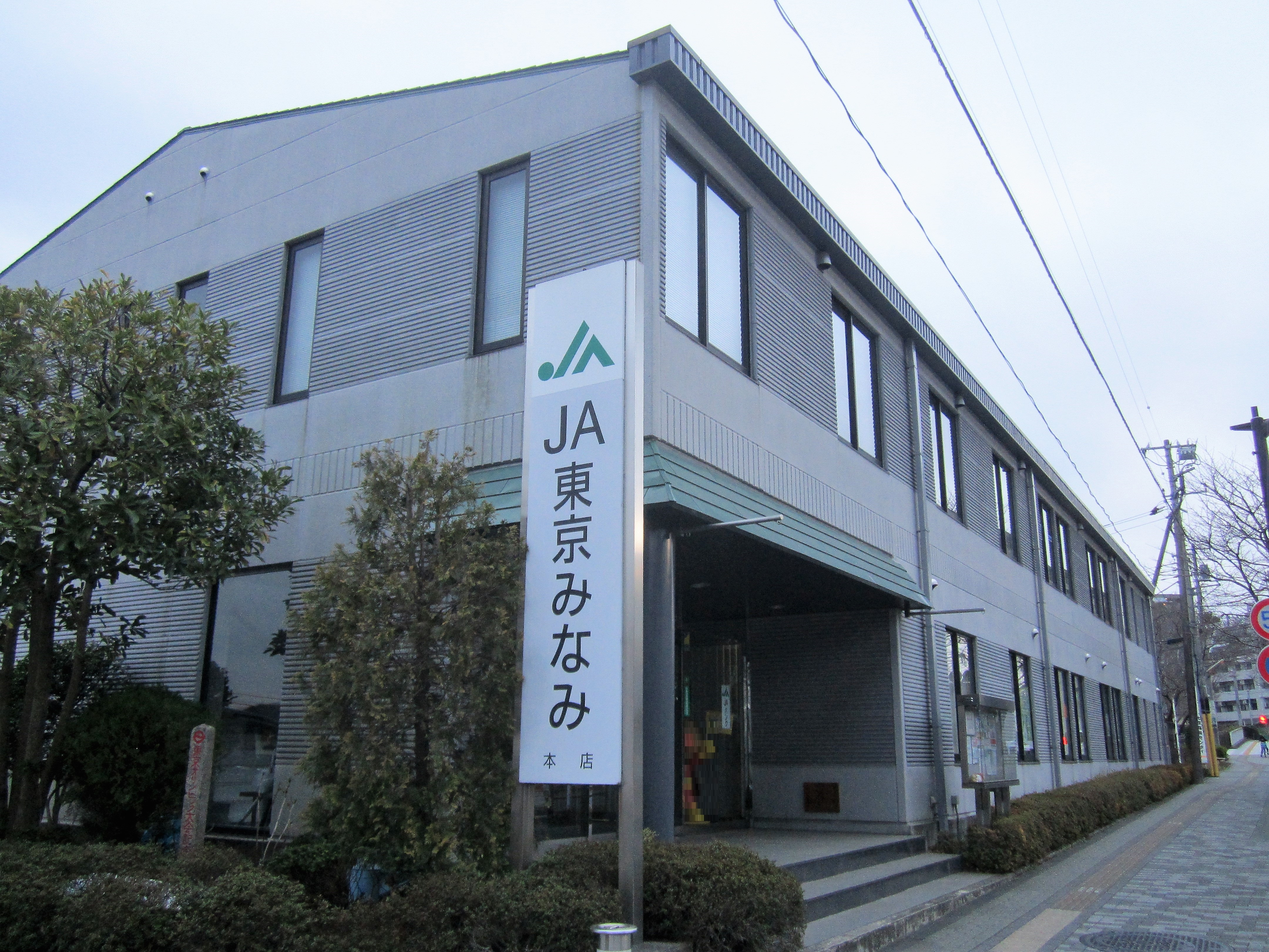 東京南農業協同組合 本店（日野市三沢）